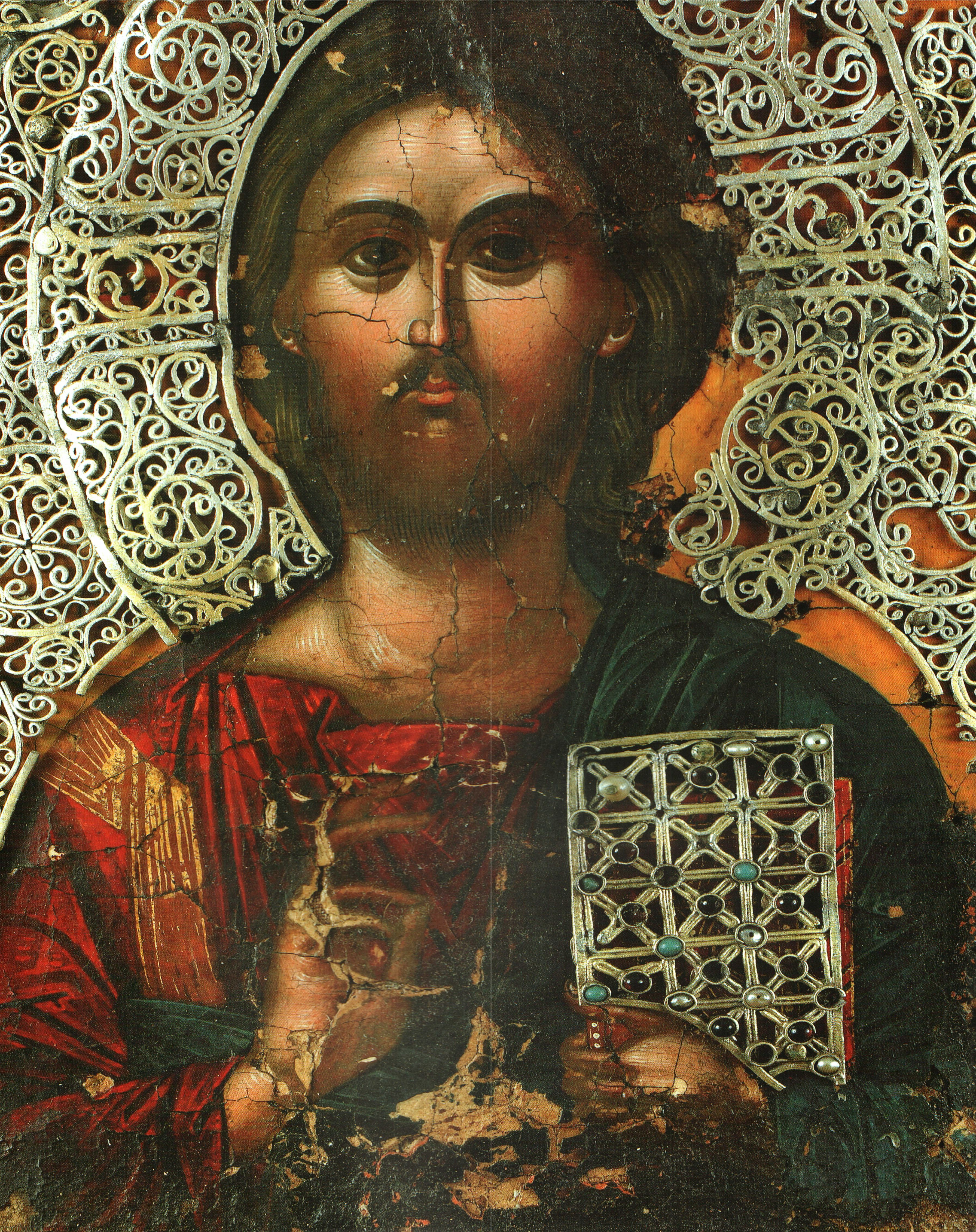 Пантократор (часть ватопедского диптиха известного как "игрушки императрицы Феодоры")